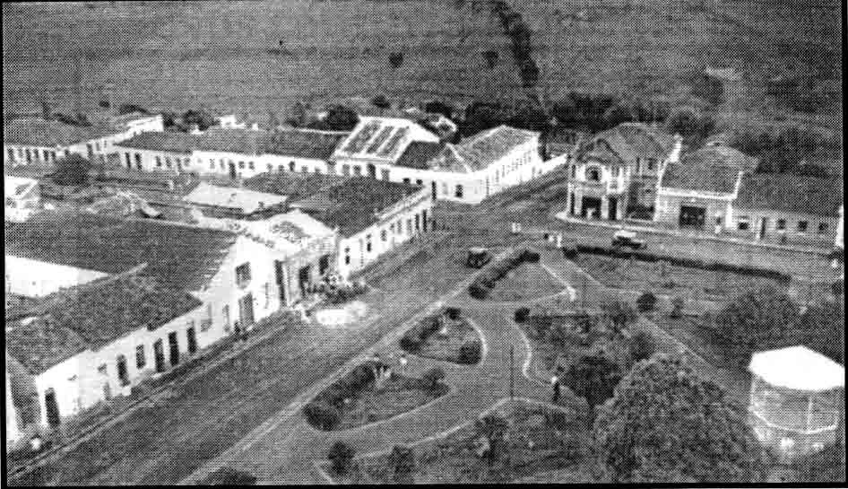 Foto da cidade de Joanópolis. After 1929.